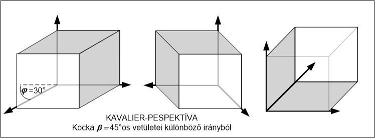 Kabinet-axonometria különböző vetítési irányokból